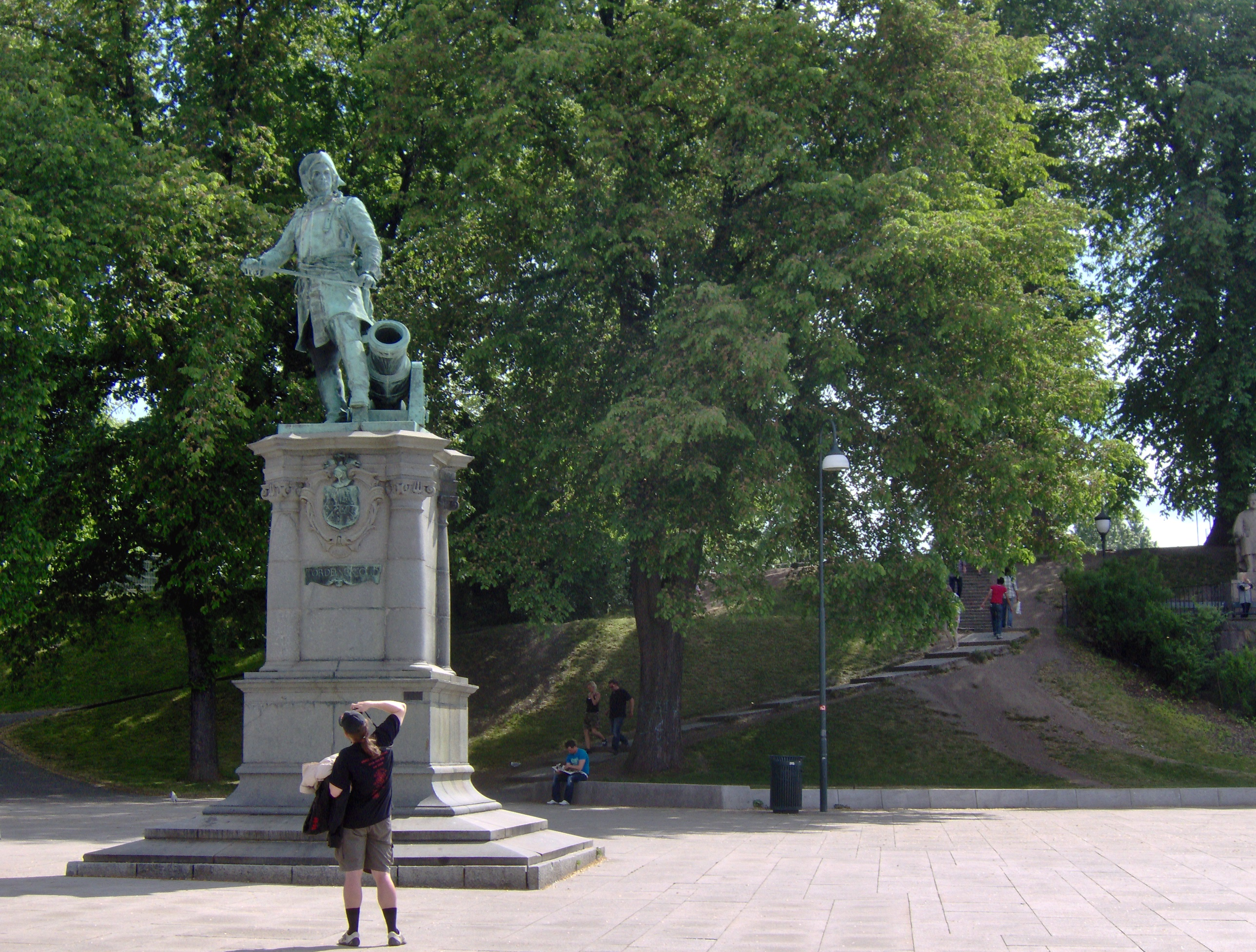 Tordenskiold har en noget mere fremtrædende plads, end i København.